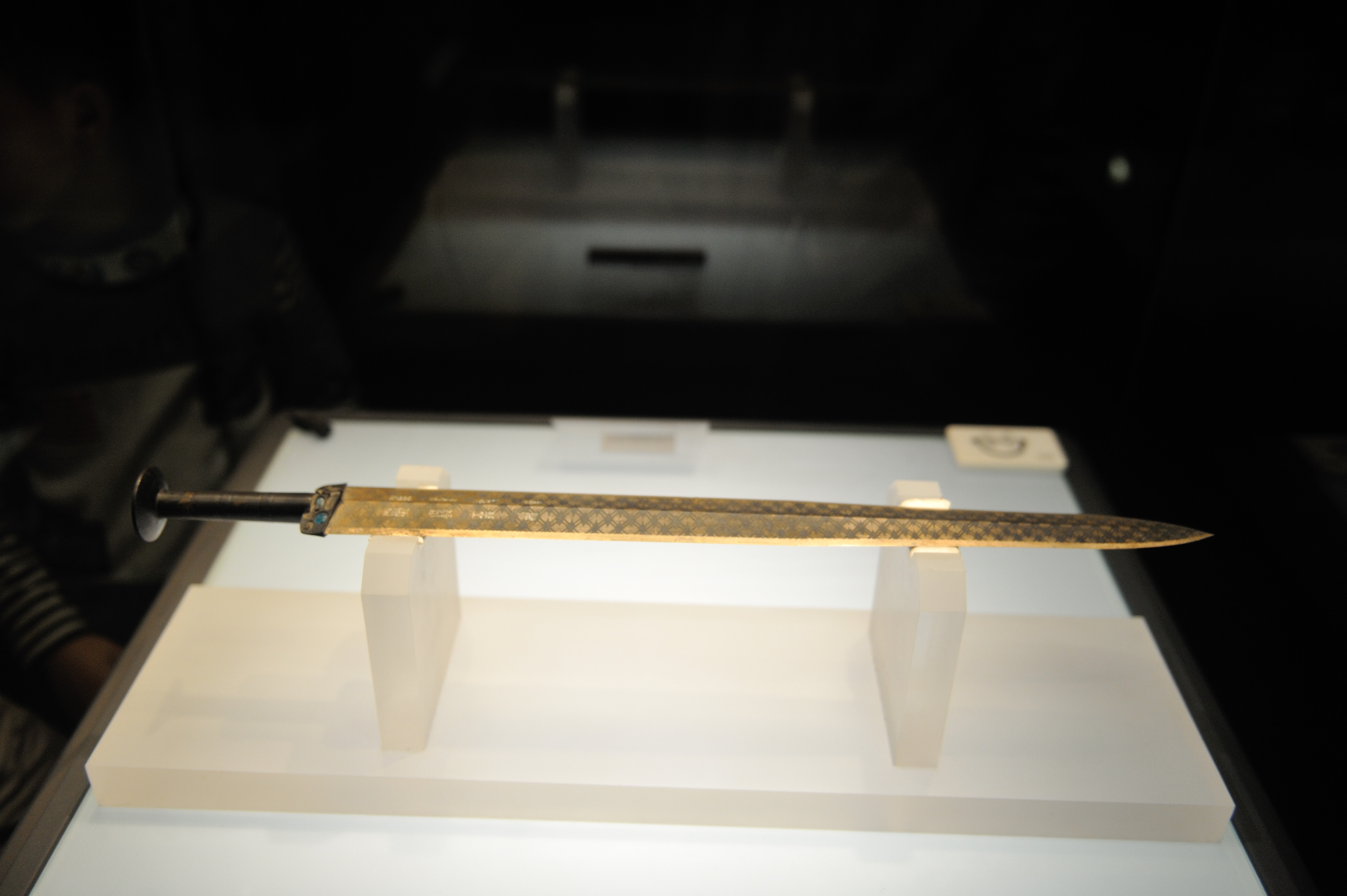 越王勾践剑，湖北省博物馆